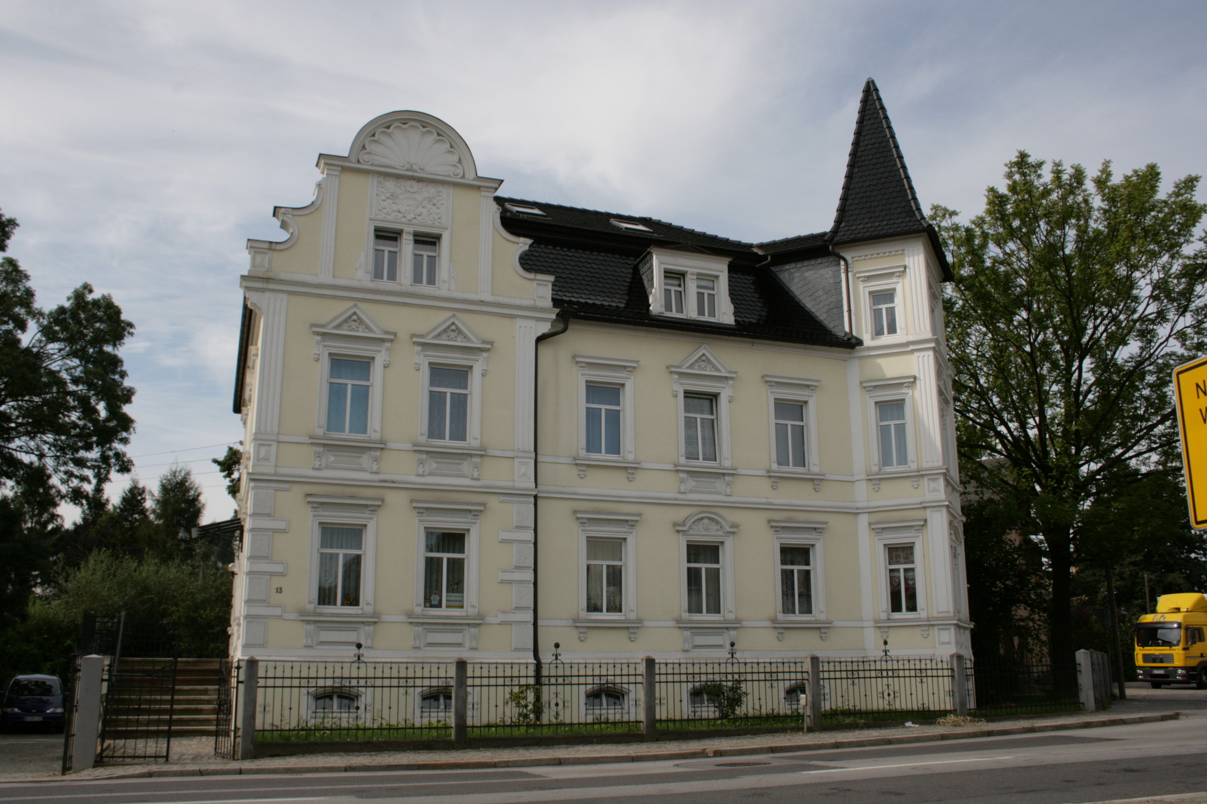 Bautzener Straße in Kirschau